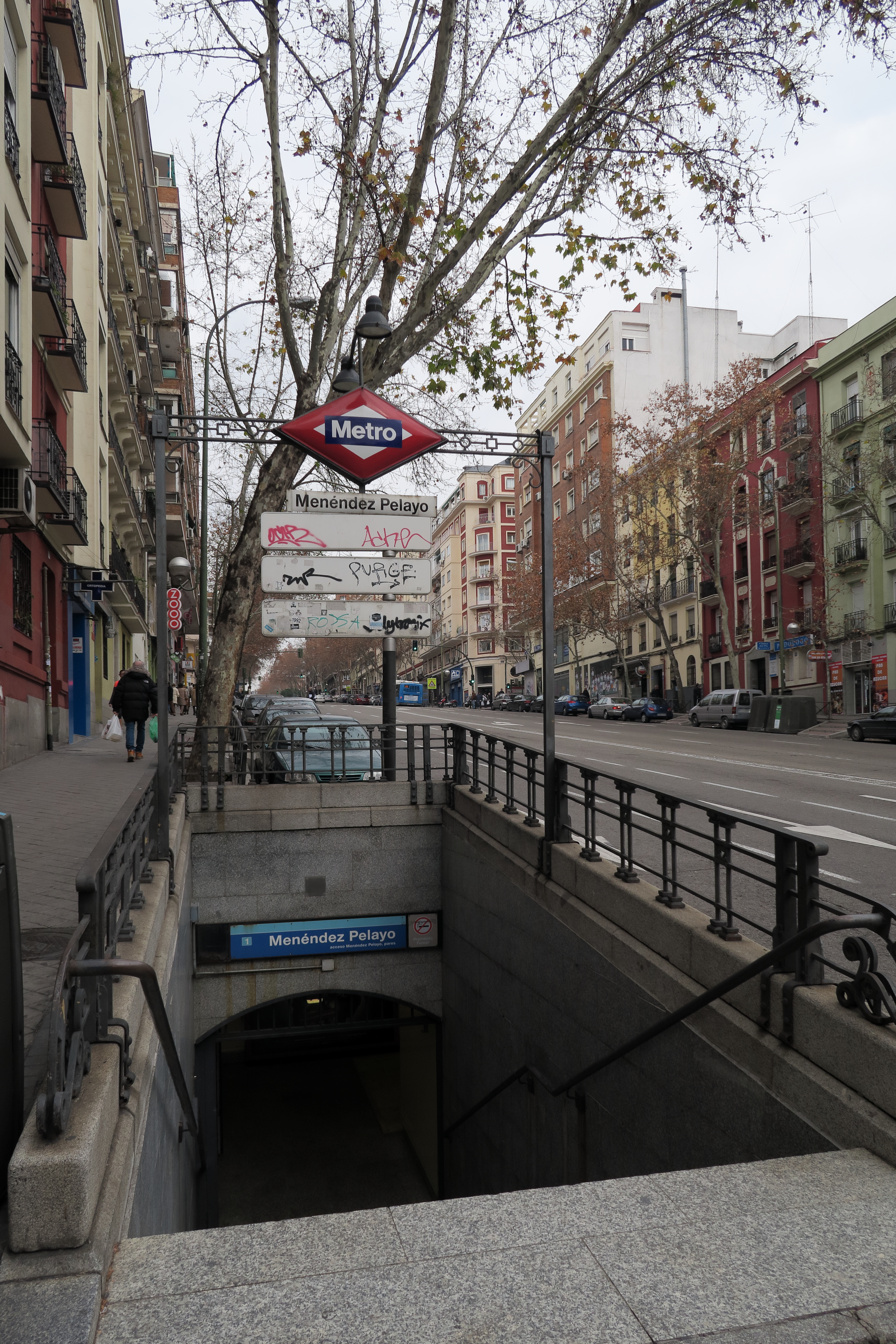 Estación de Menéndez Pelayo